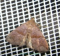 Hipoepa fractalis